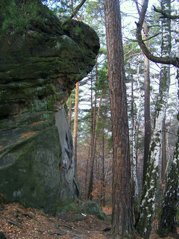 Kamienie Brodzińskiego (Paprotna, Pogórze Wiśnickie)